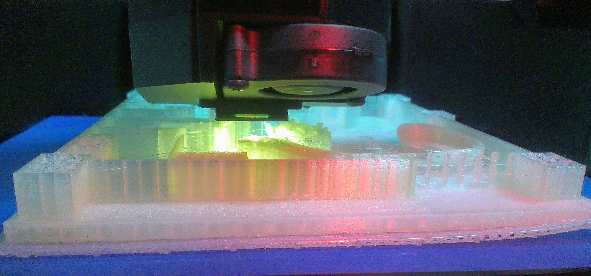 數位模型透過3D列印設備的實體化過程